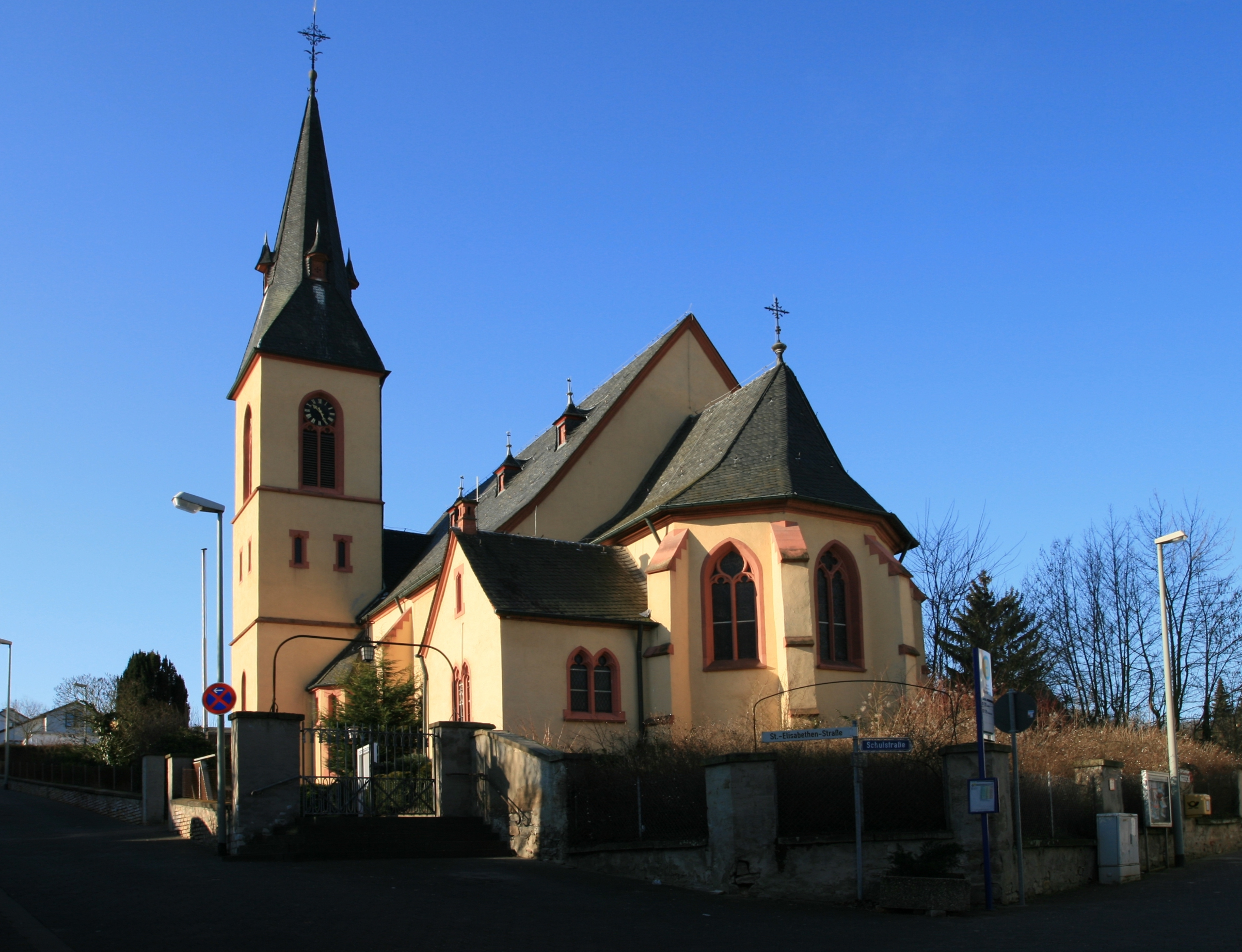 Katholische Pfarrkirche St. Martin in Oberwalluf, Rheingau, Hessen.